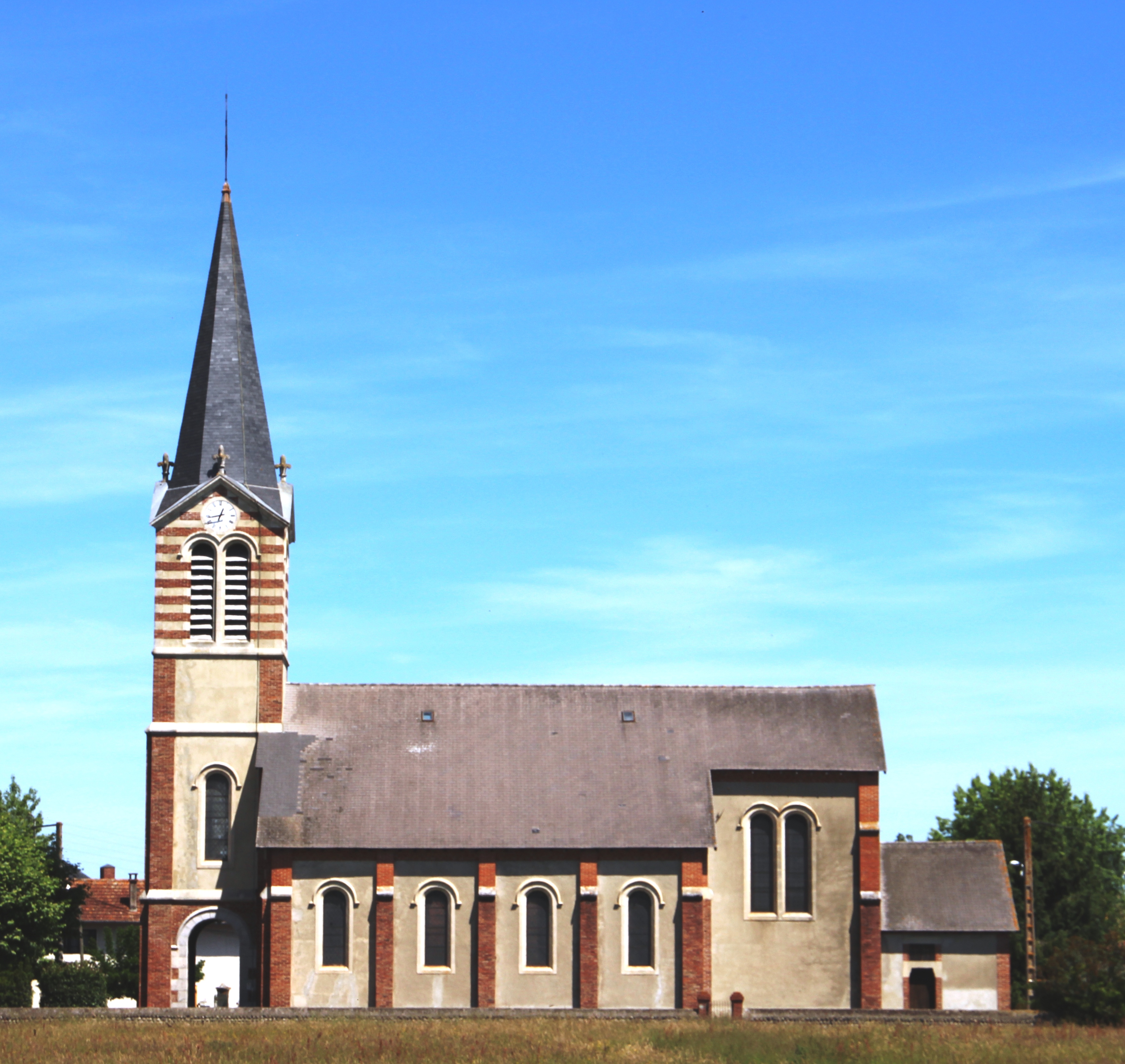 Église Saint-André de Marsac (Hautes-Pyrénées)